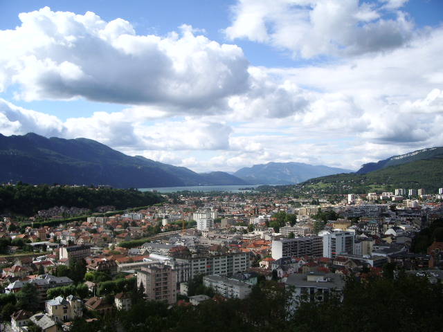 Aix-les-Bains, France.